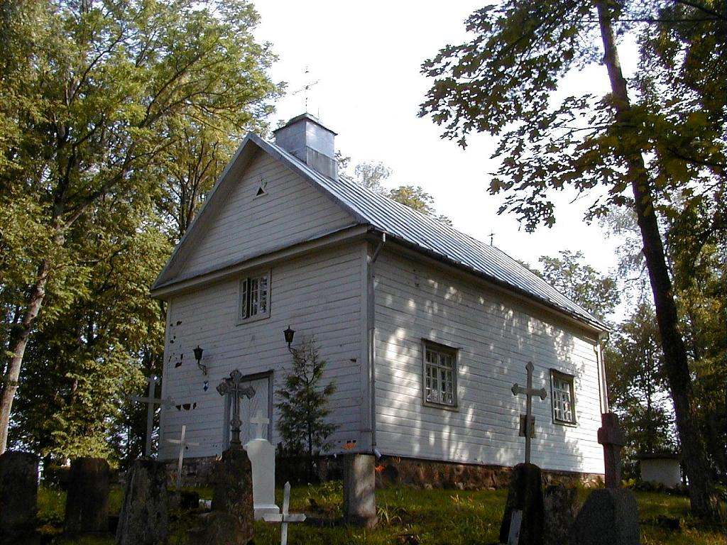 Ambeļu Svētā Jura Romas katoļu baznīca / Ambeļu katoļu baznīca. 2003-07-27